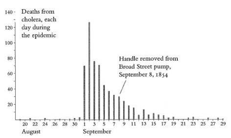 Pokles epidemie cholery po uzavření studny na Broad Street 8.9.1854